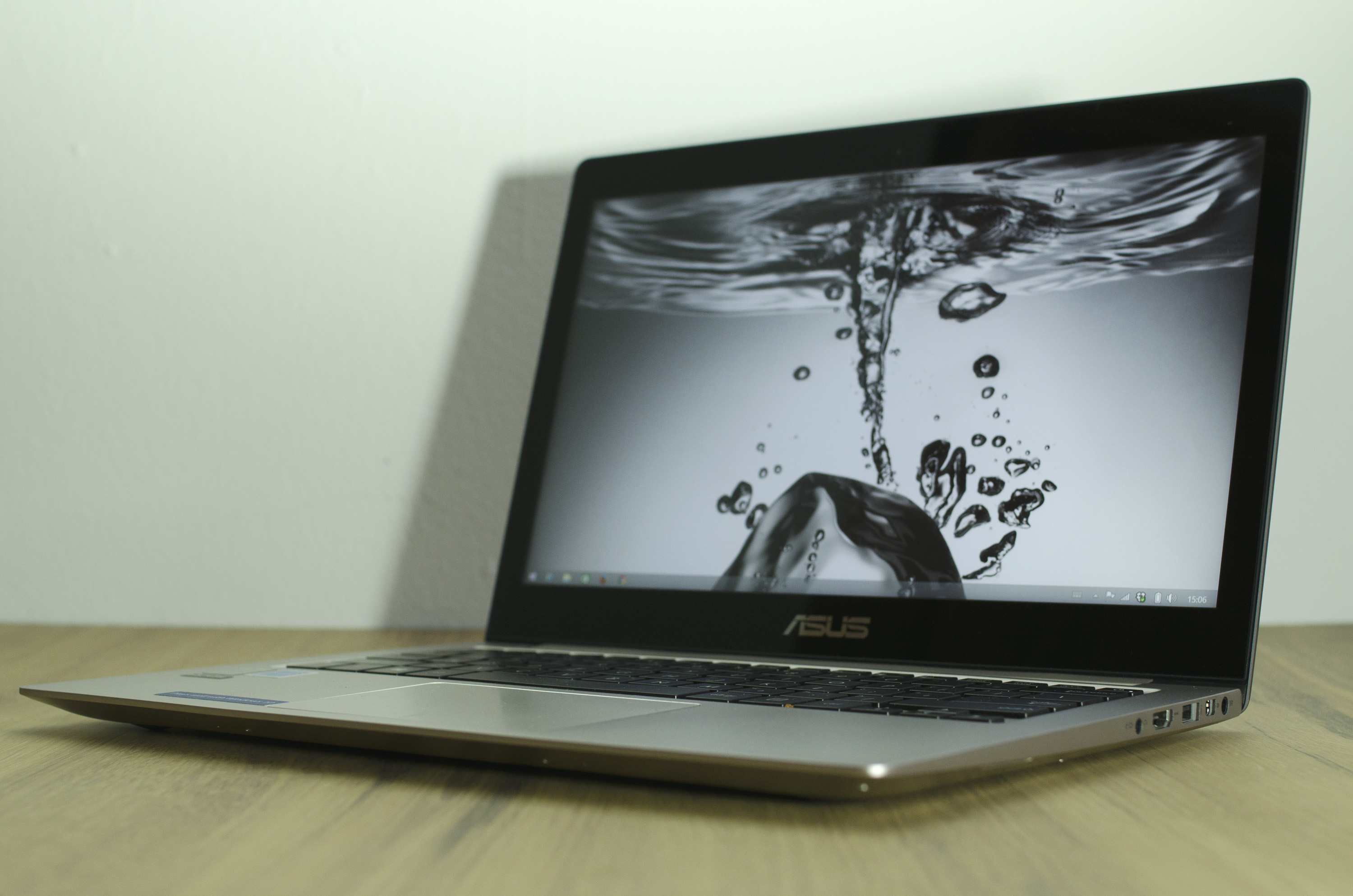 Asus Zenbook UX303LA-R5088H